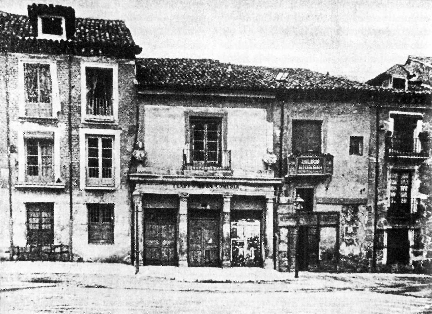 Teatro de la Comedia de Valladolid, España. Antiguo teatro de la Comedia a finales del siglo XIX.